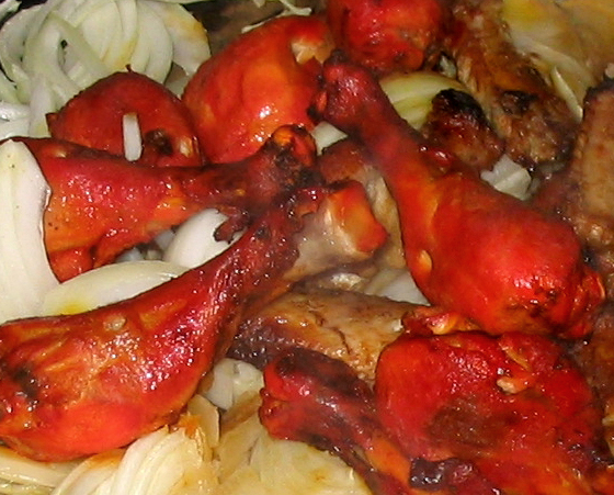 Tandoori chicken, an Indian dish